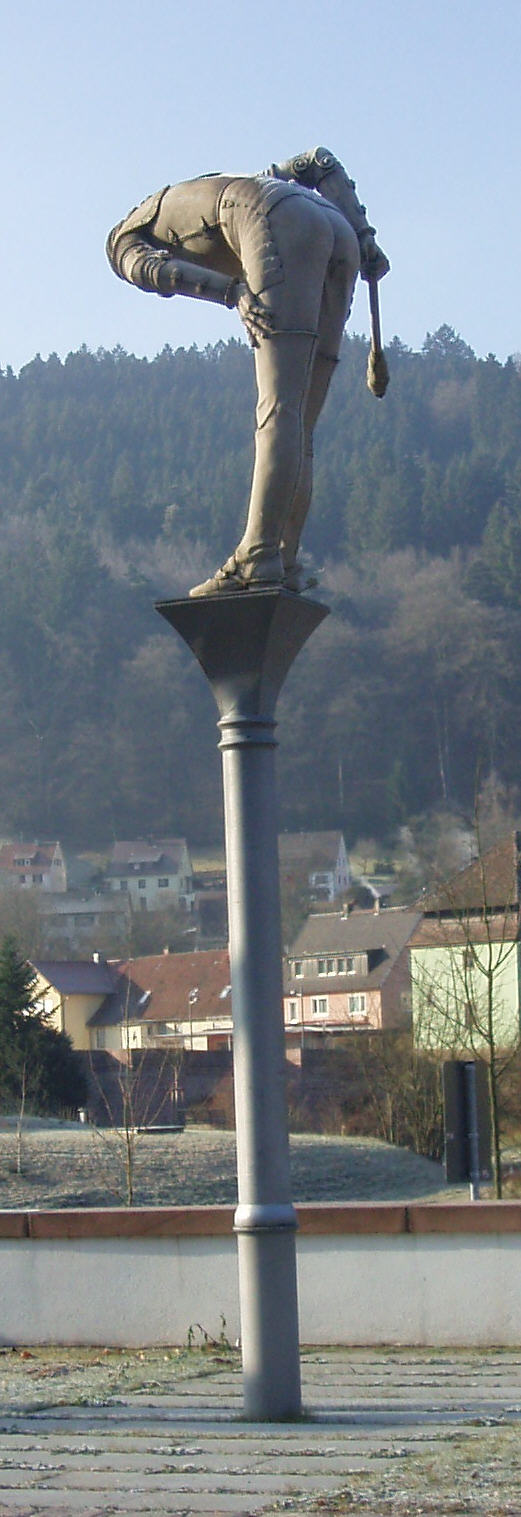 Brückenfigur in Hirsau: Melac